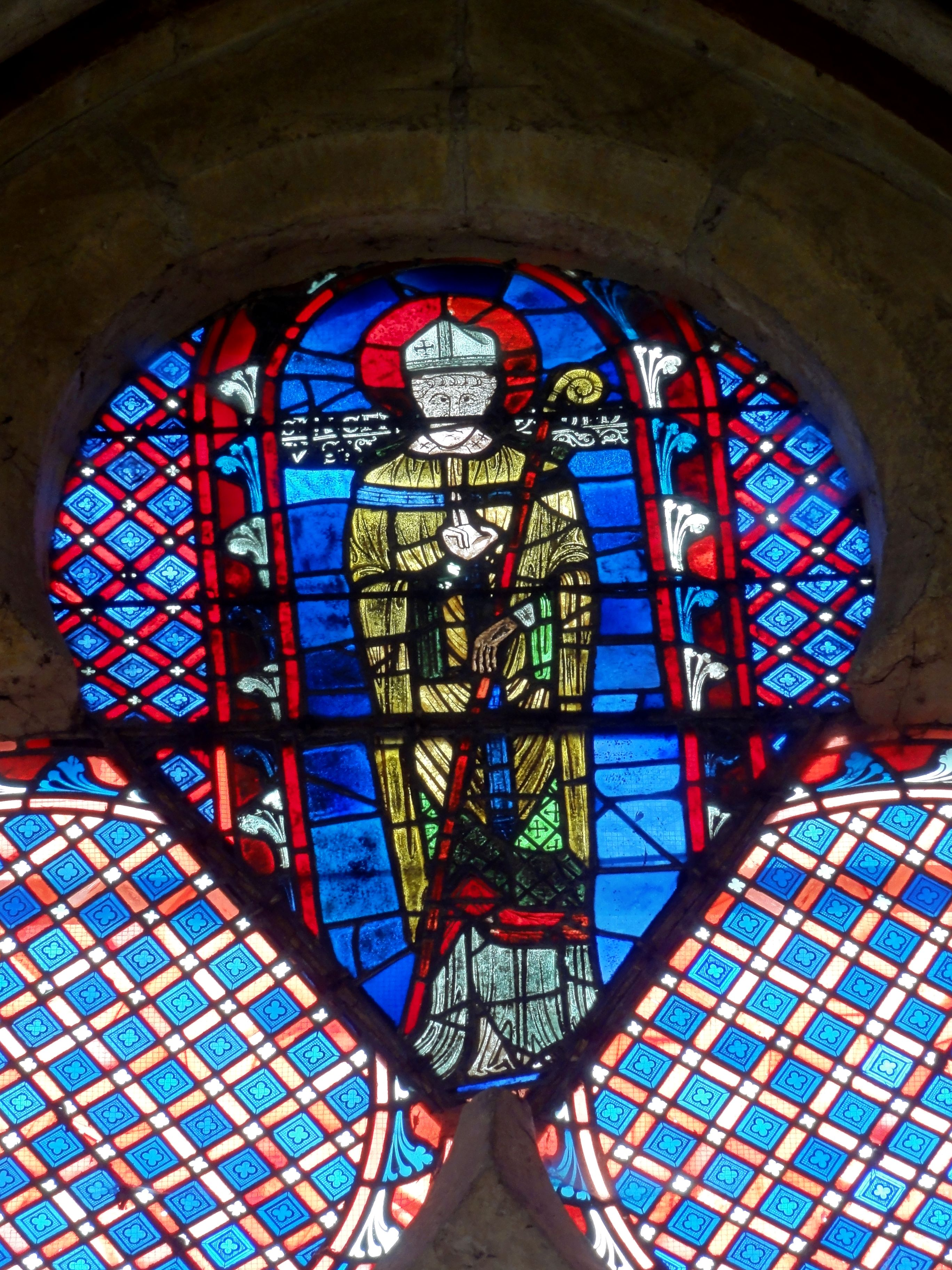 Vitrail classé de la fenêtre du chevet, représentant saint Leufroy et datant de 1250 environ.